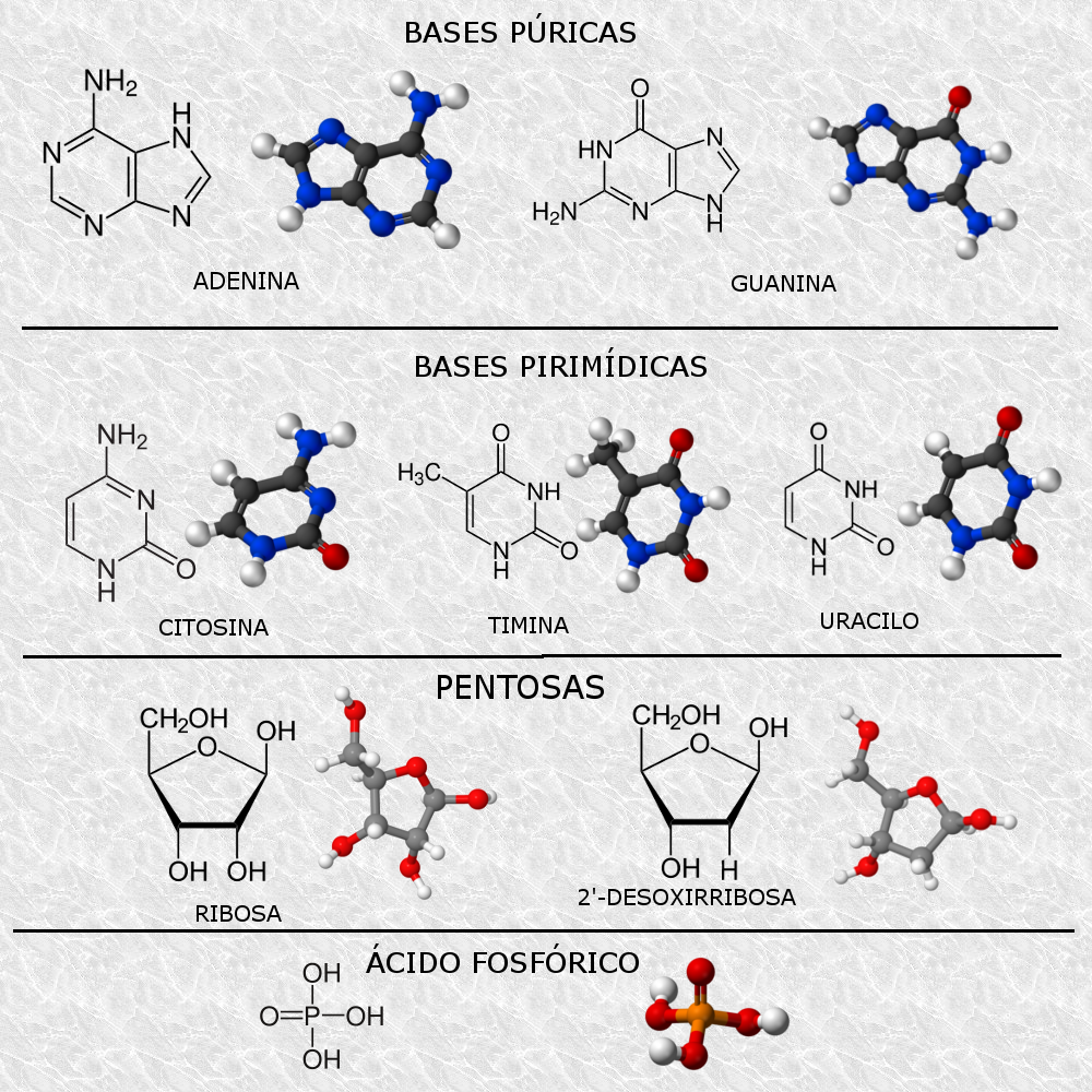 Componentes moleculares de los nucleótidos